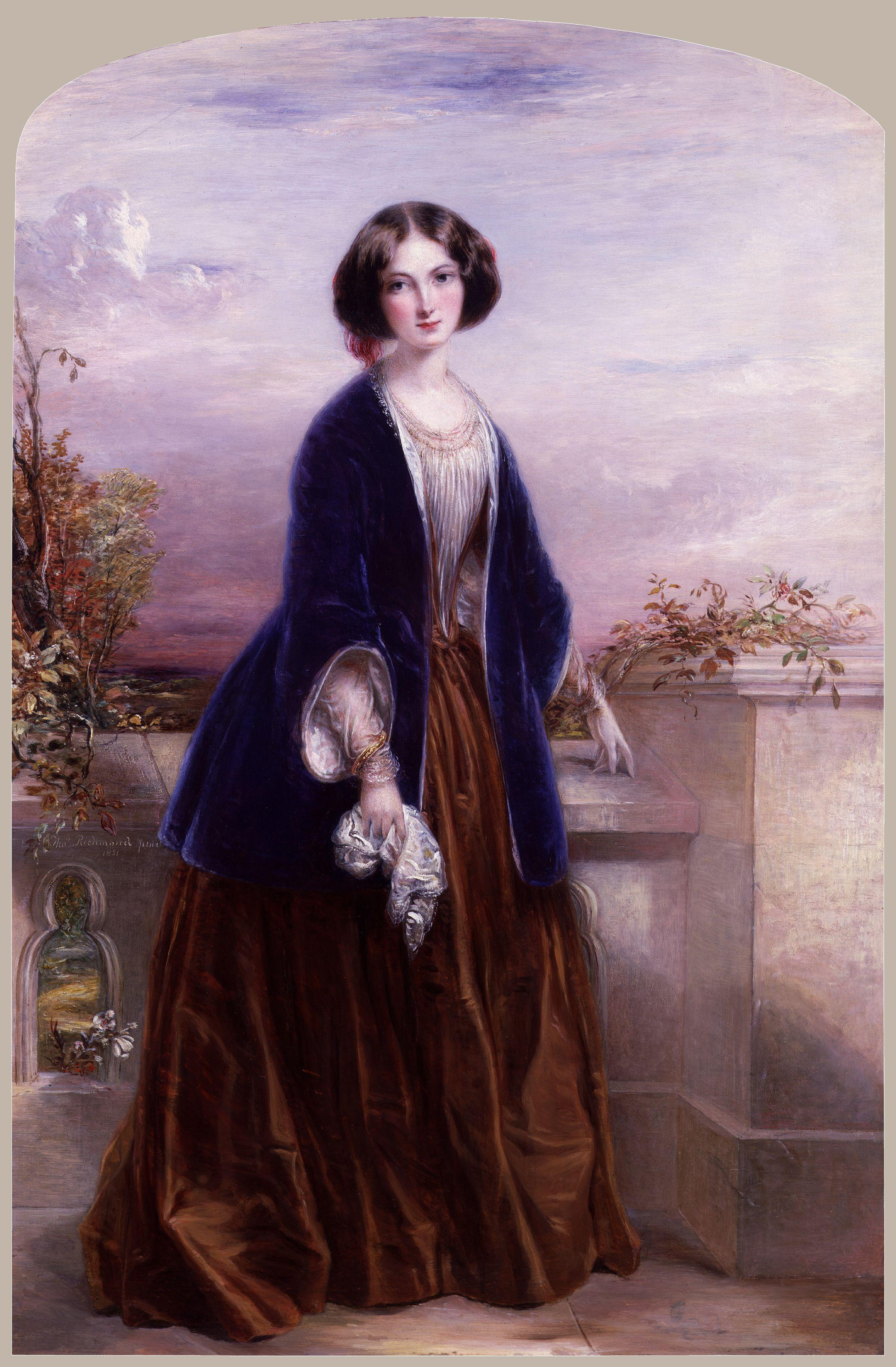 Euphemia ('Effie') Chalmers (née Gray), Lady Millais